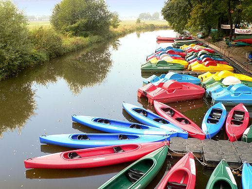 Bootsverleih an der Ise bei Gifhorn etwa 1 km vor der Mündung in die Aller Foto aufgenommen von Benutzer Benutzer:Axel Hindemith, Oktober 2005